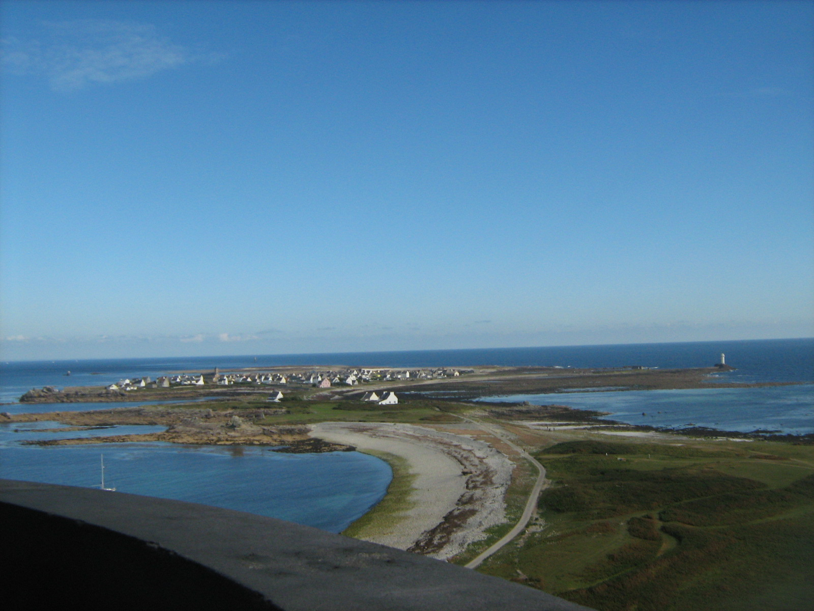 Photo prise par moi-même. Picture taken by myself.